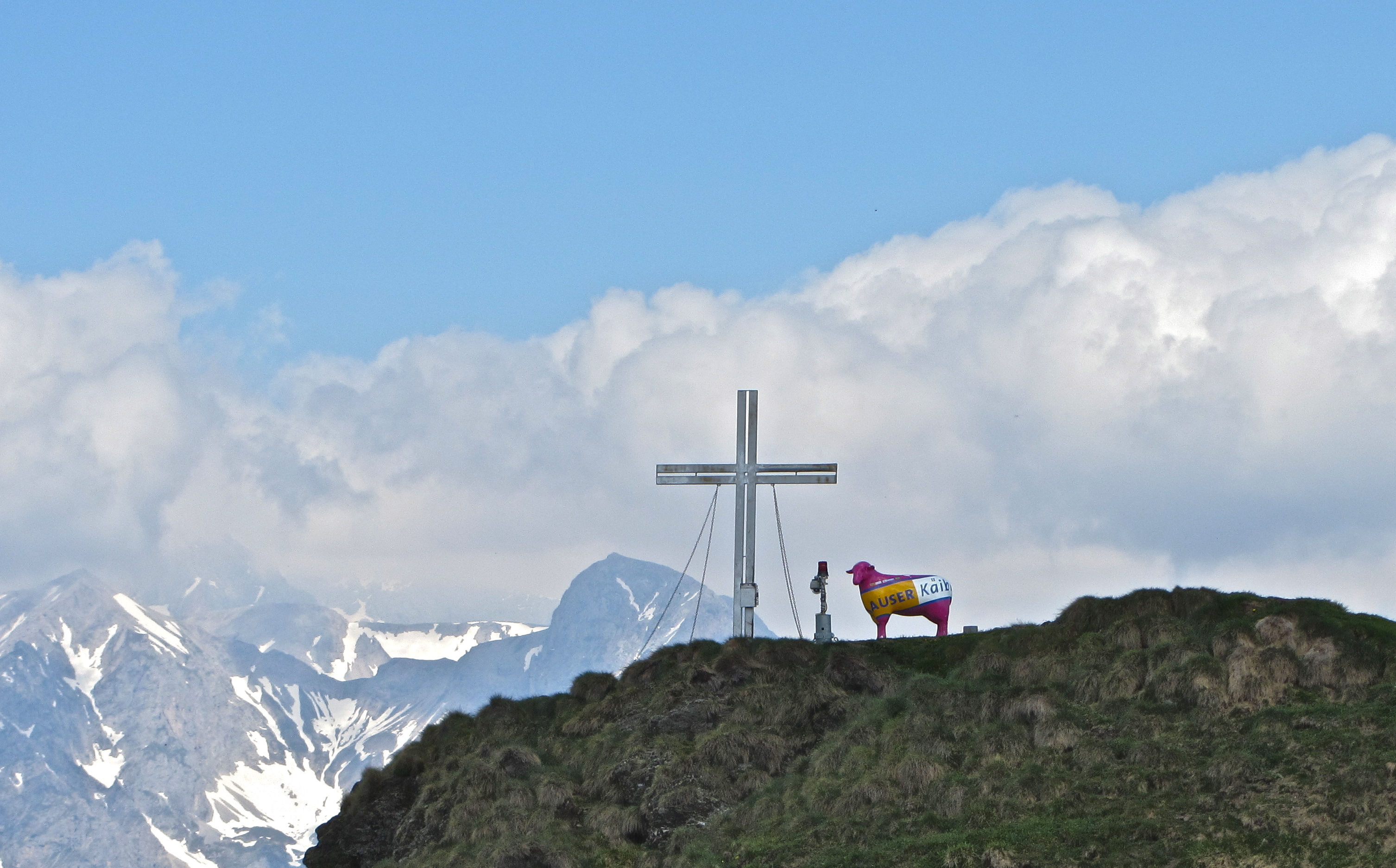 Gipfel des Hauser Kaibling (samt Gipfelkreuz) bei Haus im Ennstal (Steiermark), im Hintergrund das Dachsteinmassiv